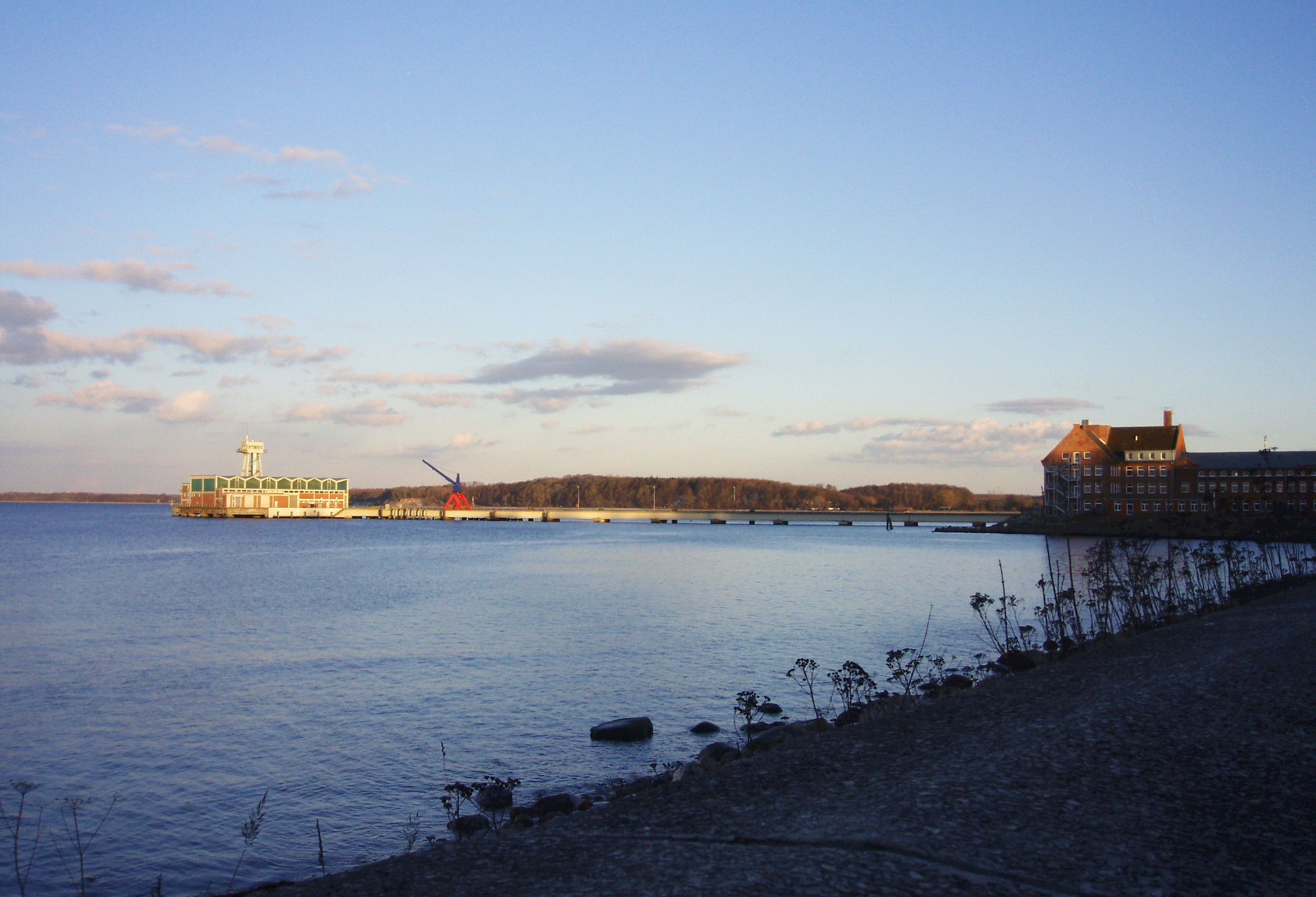 Eckernförde